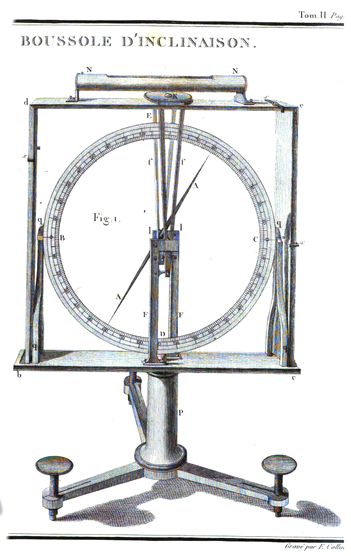 Boussole d'inclinaison, Antoine Bruny d'Entrecasteaux, Voyage de Dentrecasteaux, envoyé à la recherche de La Pérouse, 1808, page 21.